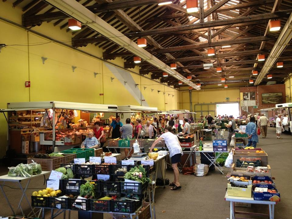 Place des Malgré Nous et Mairie de Wittenheim Photo offerte par dont Webcreators est l'éditeur à la communauté Wikipedia